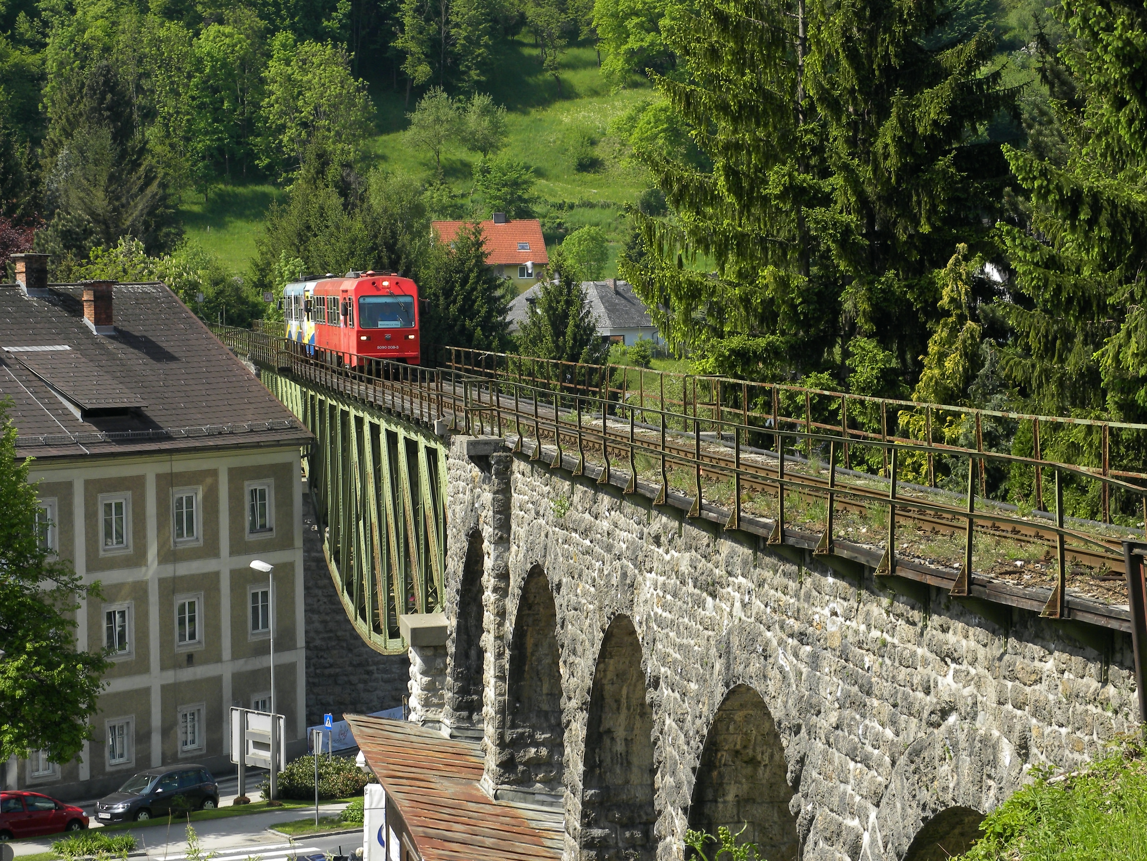 Das aus mehrachsigen Steinbogenteilen bestehende Viadukt mit stählerner Fischbauchkonstruktion als Mittelteil wurde im Zuge des ersten Bauabschnitts der Ybbstalbahn um 1896 errichtet. Ein Zug bestehend aus zwei Triebwagen der Reihe 5090 fährt über den Viadukt.